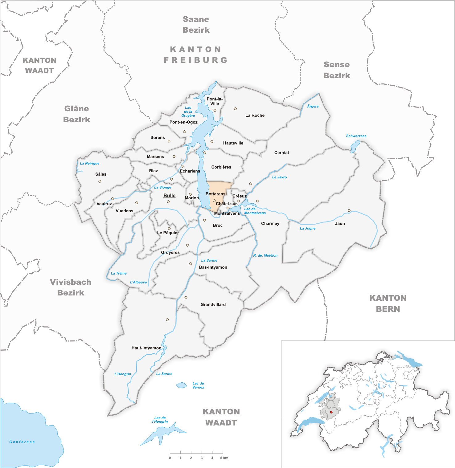 Municipality Botterens